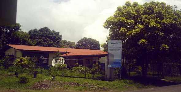 Escuela de Villa Lourdes